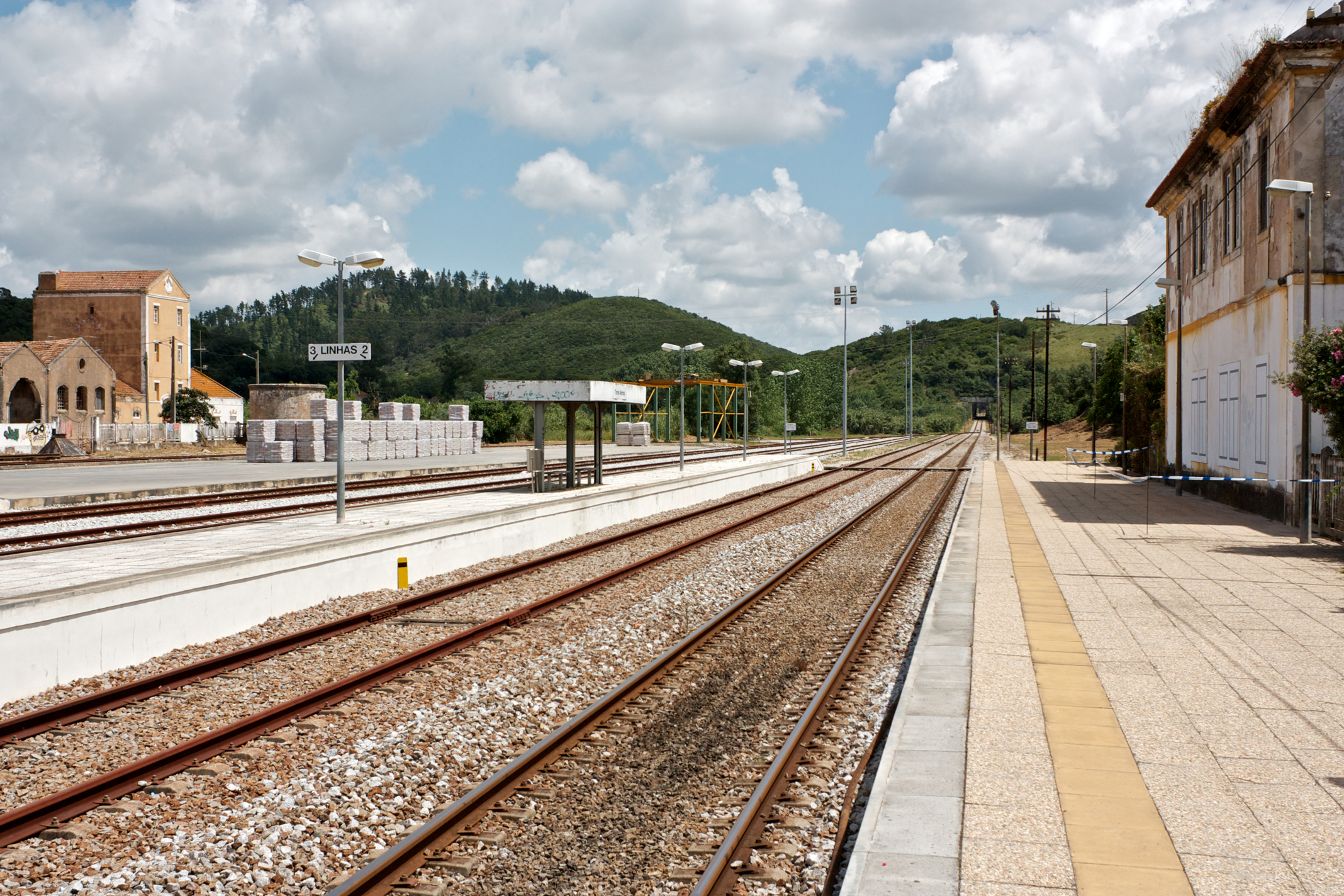 Tipo: E Estação Local: Torres Vedras [Linha do Oeste, PK 64] Data e hora: 19 de Maio de 2011 [14h24]